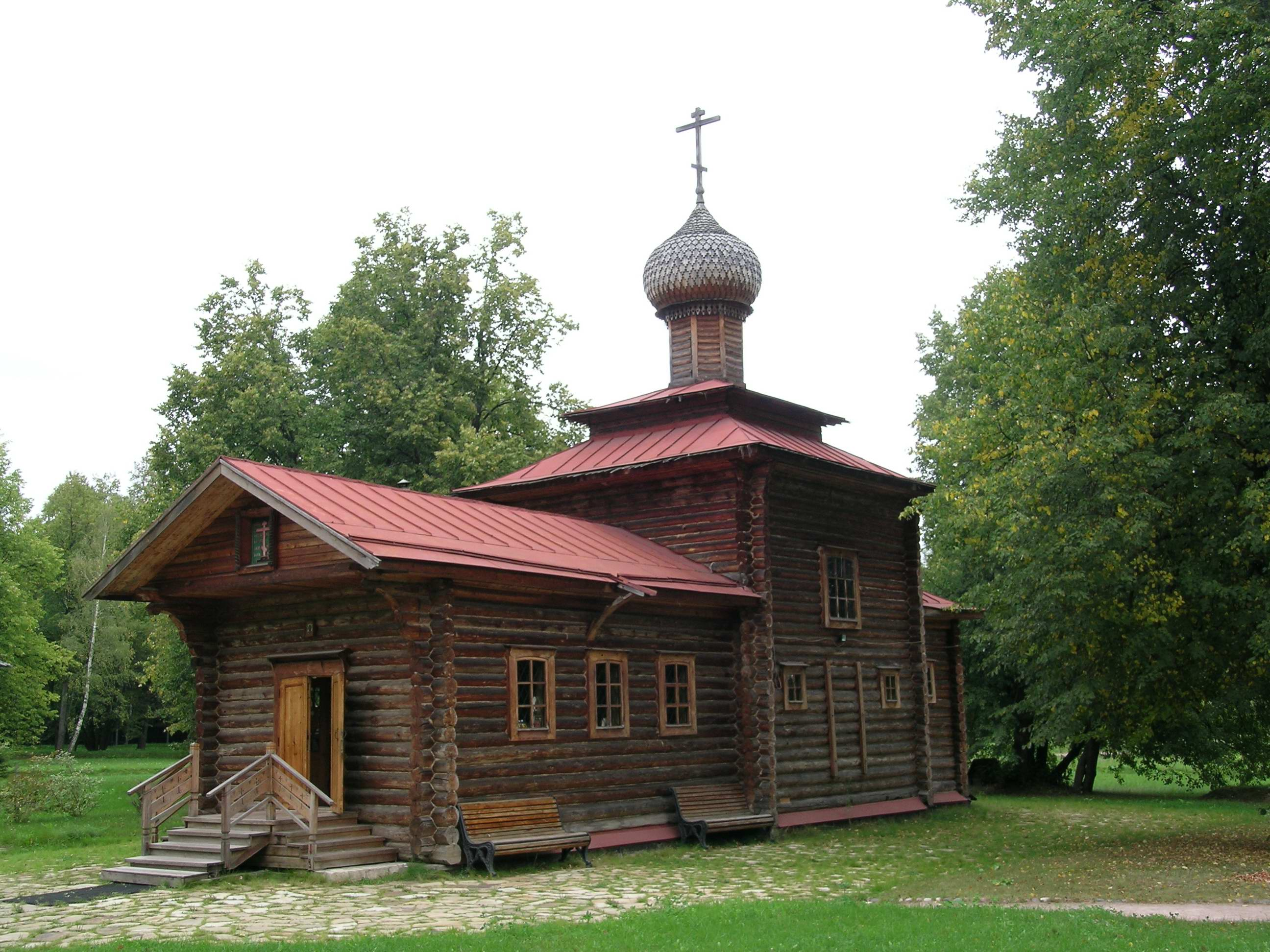 Бутовский полигон. Храм на территории полигона